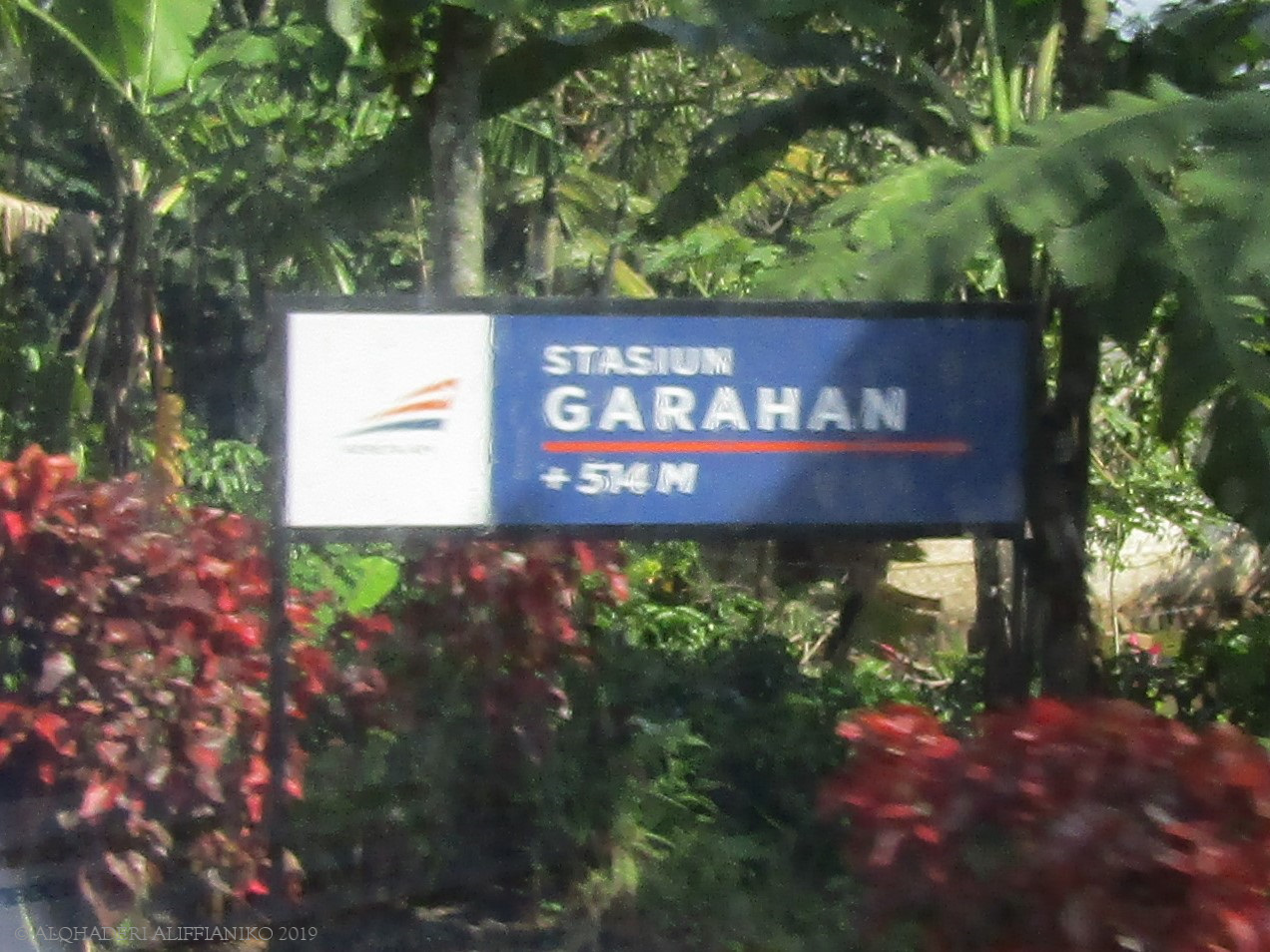 Papan nama Stasiun Garahan yang ketinggiannya berubah dari +589 m menjadi +514 m